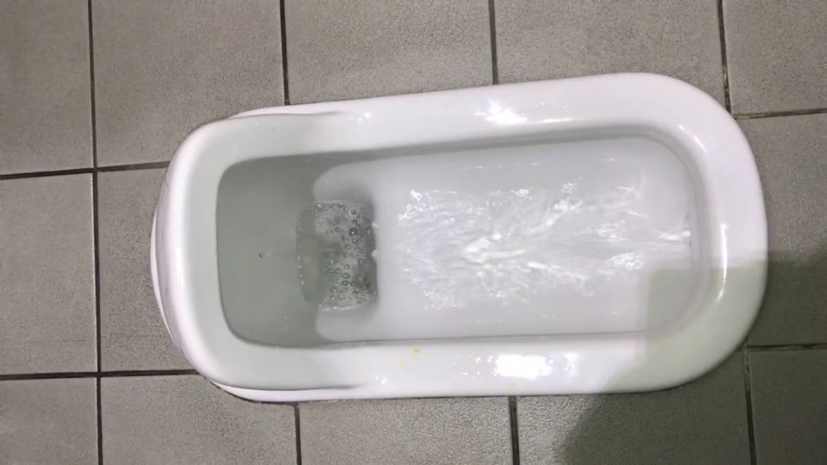 薬剤洗浄中